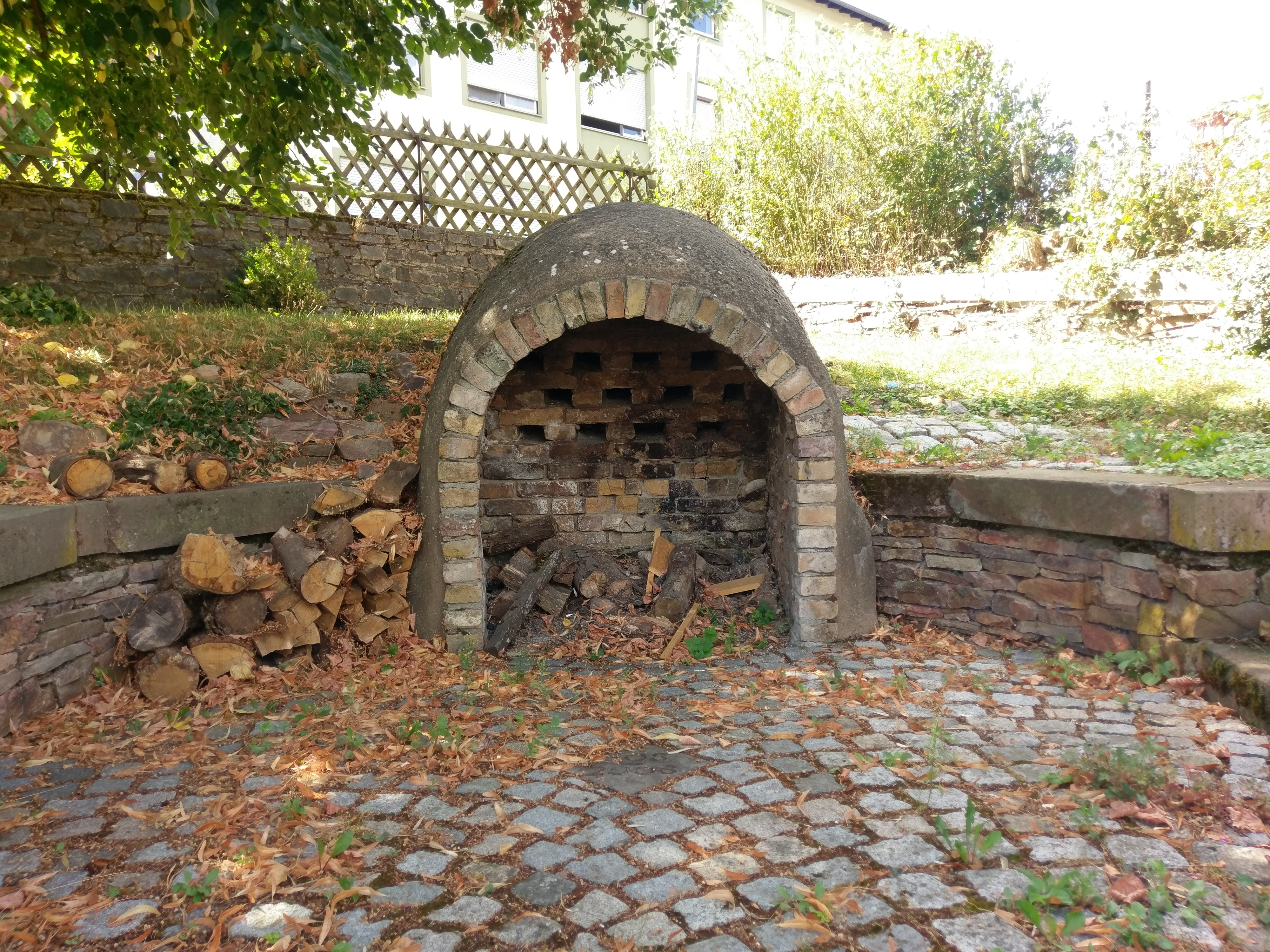 Rekonstruktion des Aulhausener Töpferofens von 2007/2008. Töpferei in Aulhausen seit dem 12. Jahrhundert. Aulhausen, Stadtteil von Rüdesheim am Rhein.